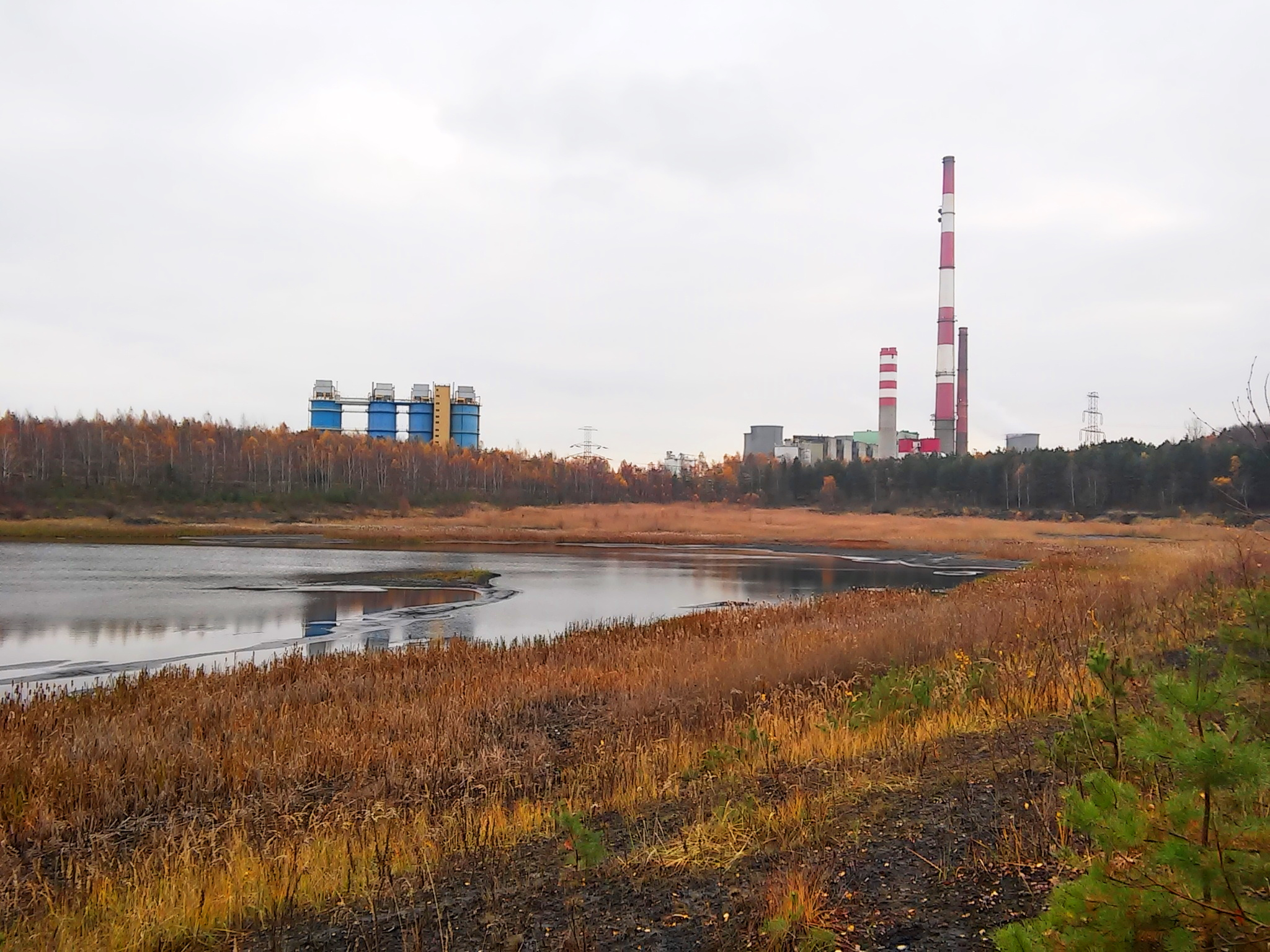 Staw Osadowy po Kopalni Siersza